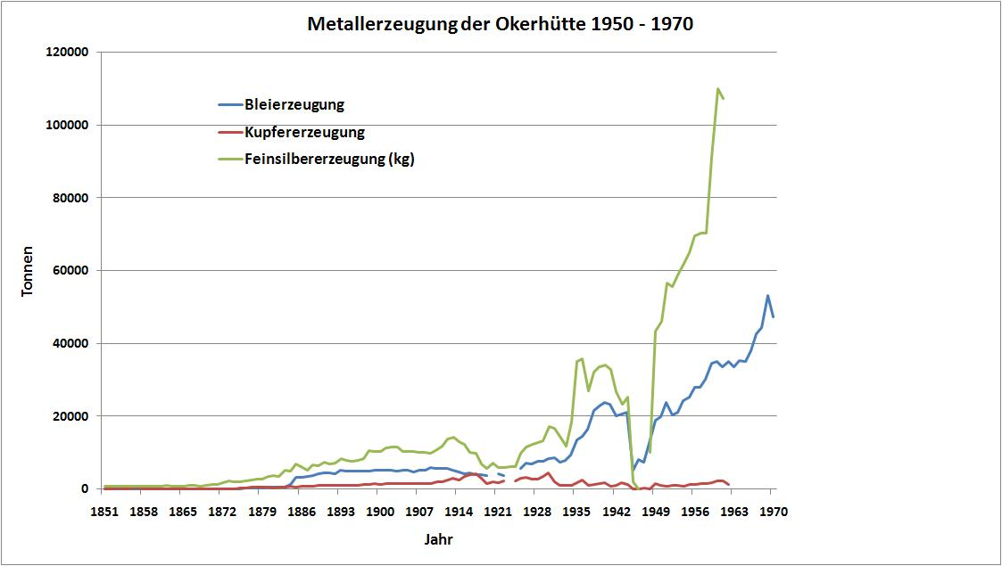 Produktionszahlen der BKO Oker